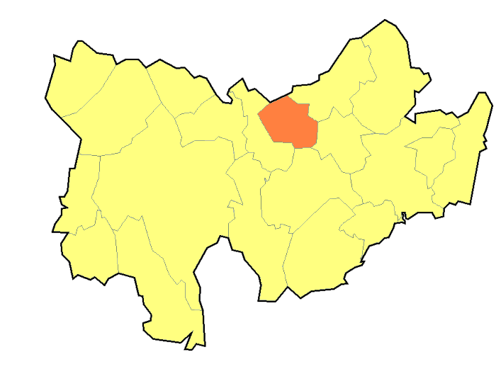 Hranice Uhřice (Vyškov-(Bučovice)- czech republic)